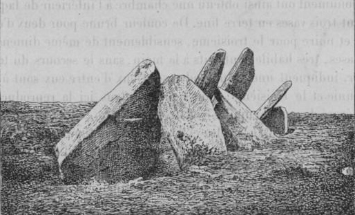 Saint-Goazec : les restes de l'allée couverte de Castel-Ruffel (Paul du Châtellier, Exploration des tumulus des Montagnes Noires (Finistère), "Bulletin archéologique du Comité des travaux historiques et scientifiques", 1901)